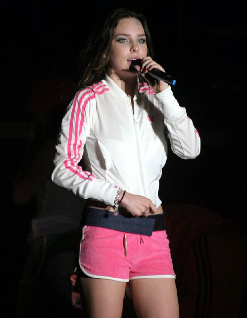 Belinda Peregrín Schüll